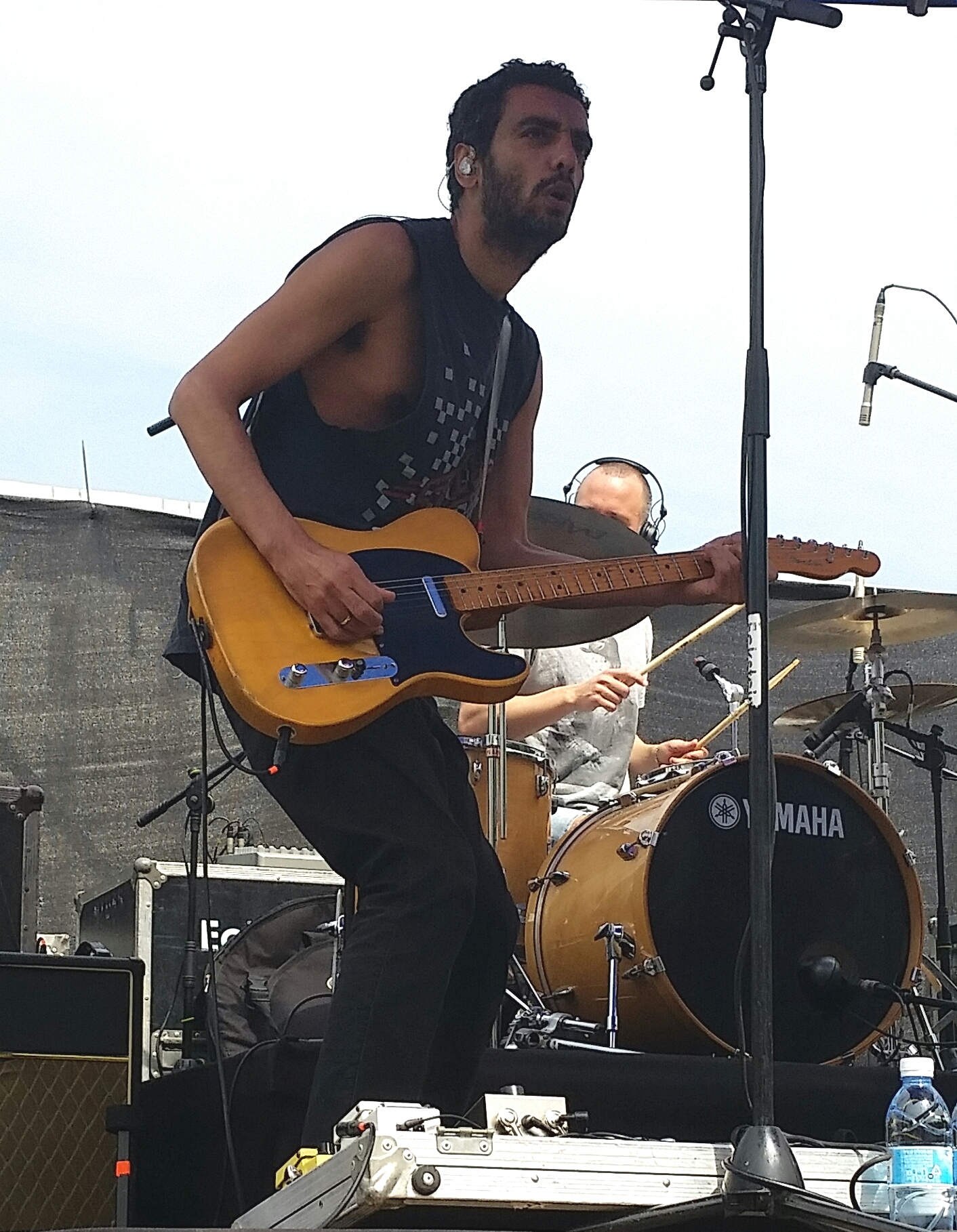 דודו טסה בהופעה בחיפה